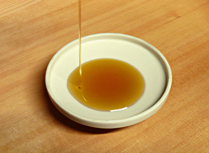 Sesame Oil (ごま油)